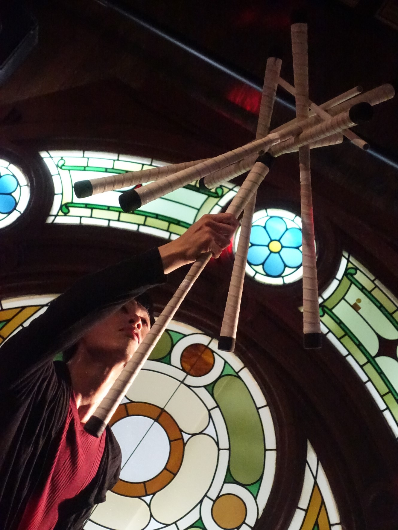 Stick Artist KIAの写真。2019年6月29日、うっふCafe&Barにて撮影。